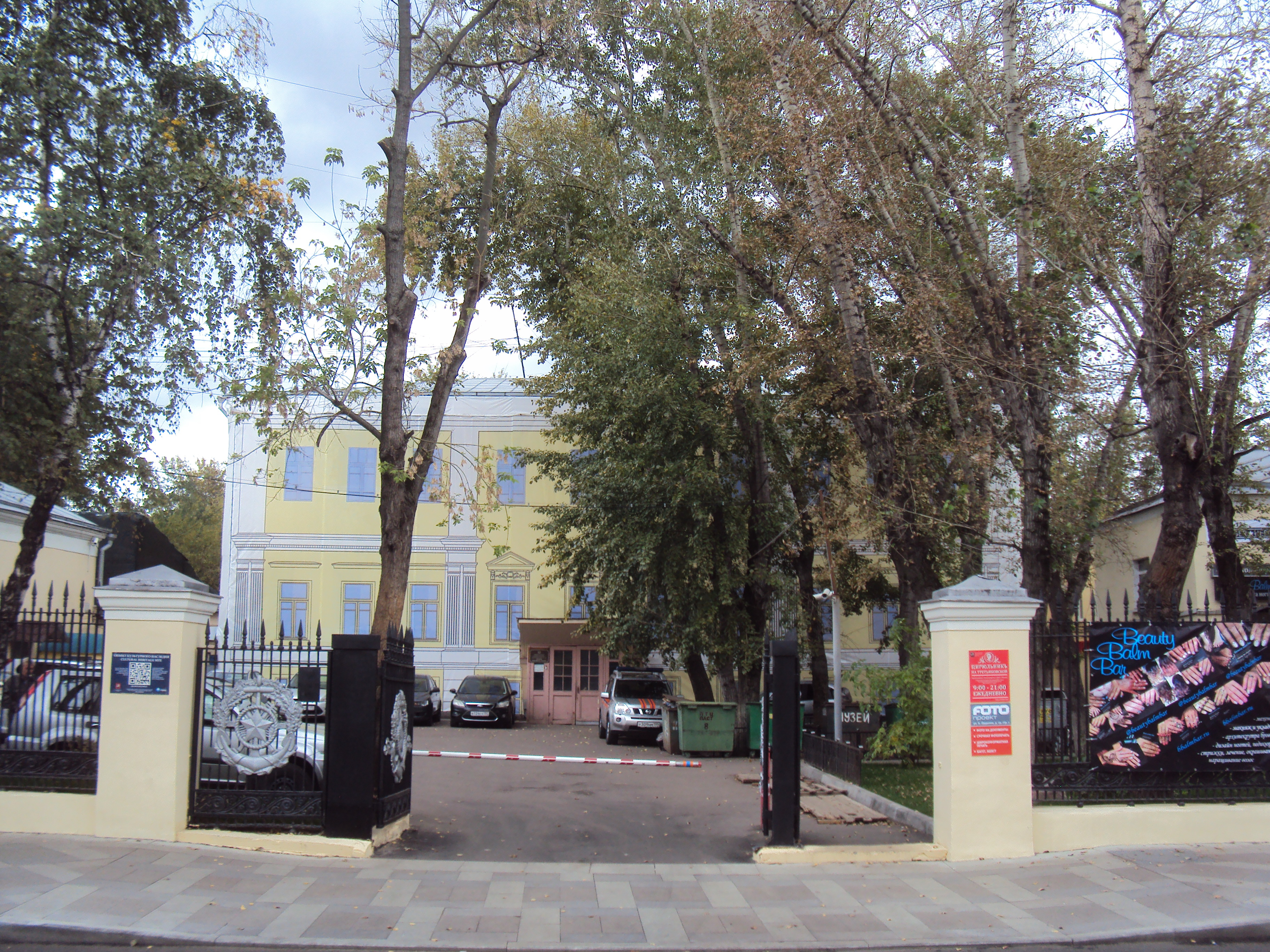 Главный дом городской усадьбы: Ордынка Б. ул., дом 19, строение 1, Замоскворечье, Центральный округ, Москва